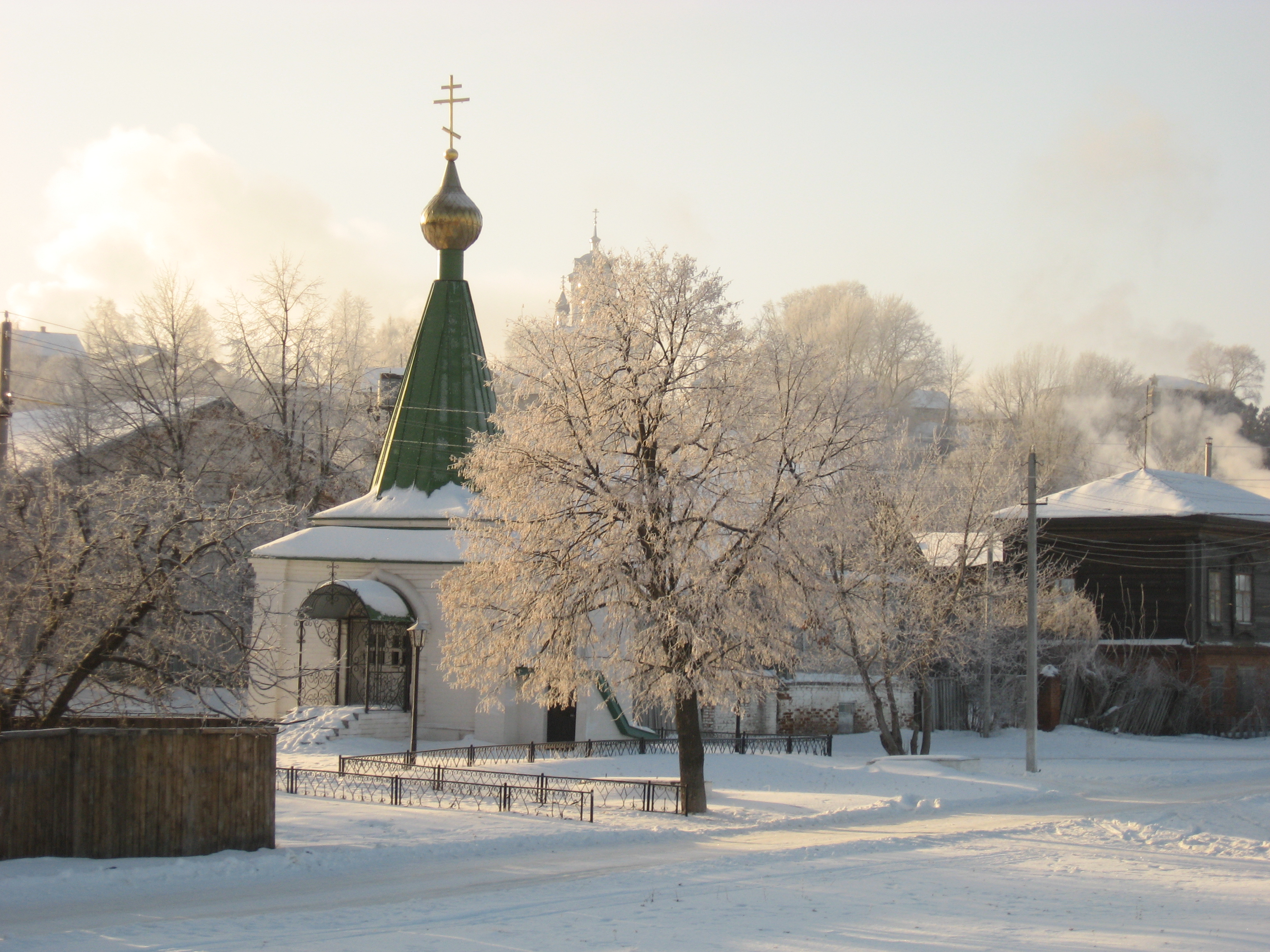 Стрелецкая часовня г. Козьмодемьянска (Республика Марий Эл)